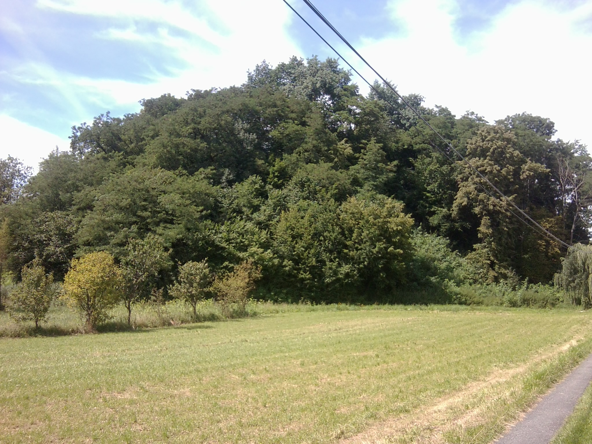 Grodzisko Zamczysko w Podegrodziu latem